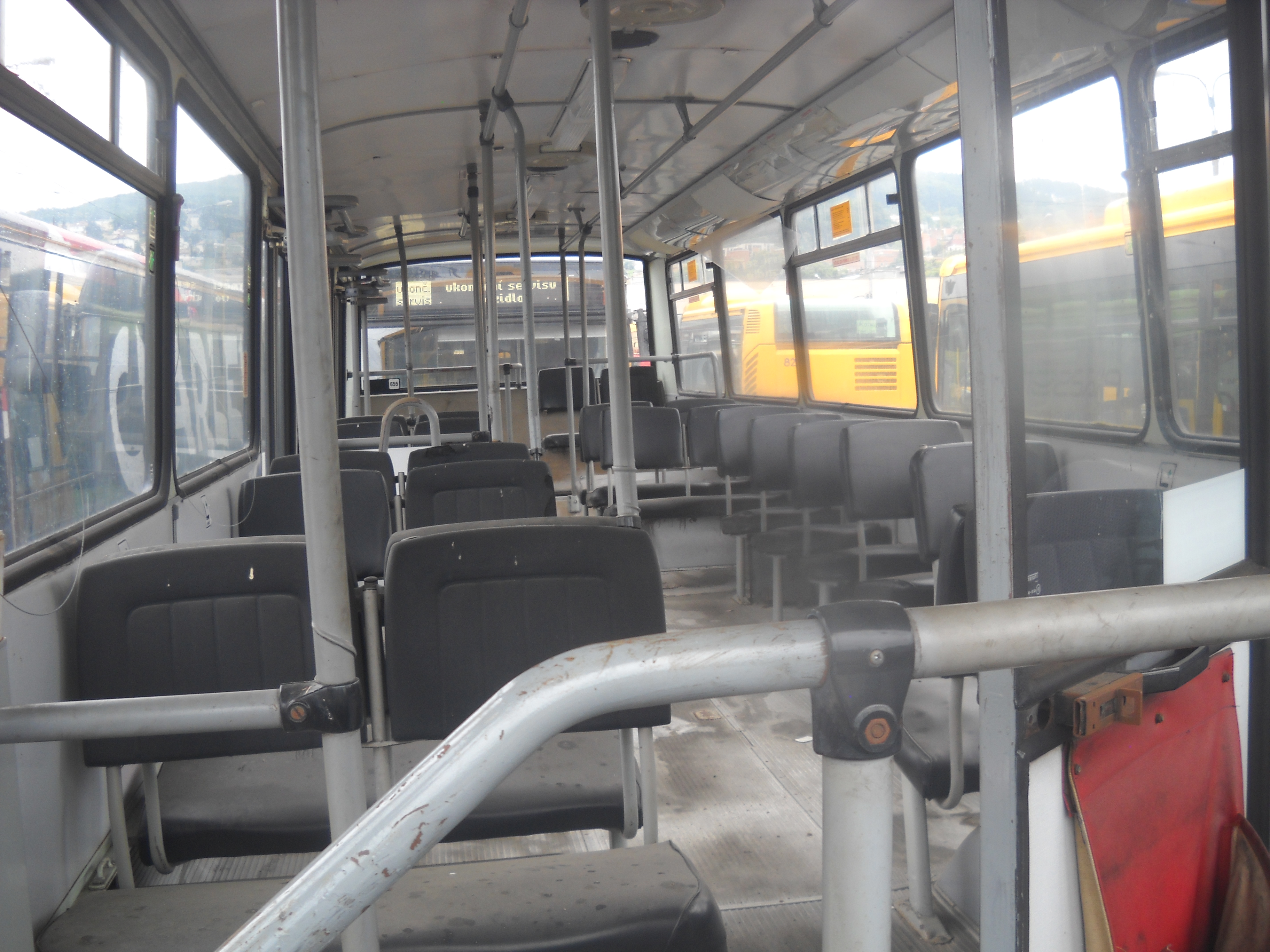 Interiér zlínského autobusu ev.č. 655, který čeká na rekonstrukci